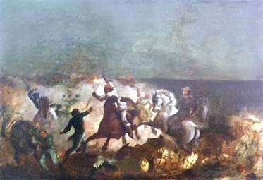 Oleo sobre tela de la Batalla de las Queseras del Medio